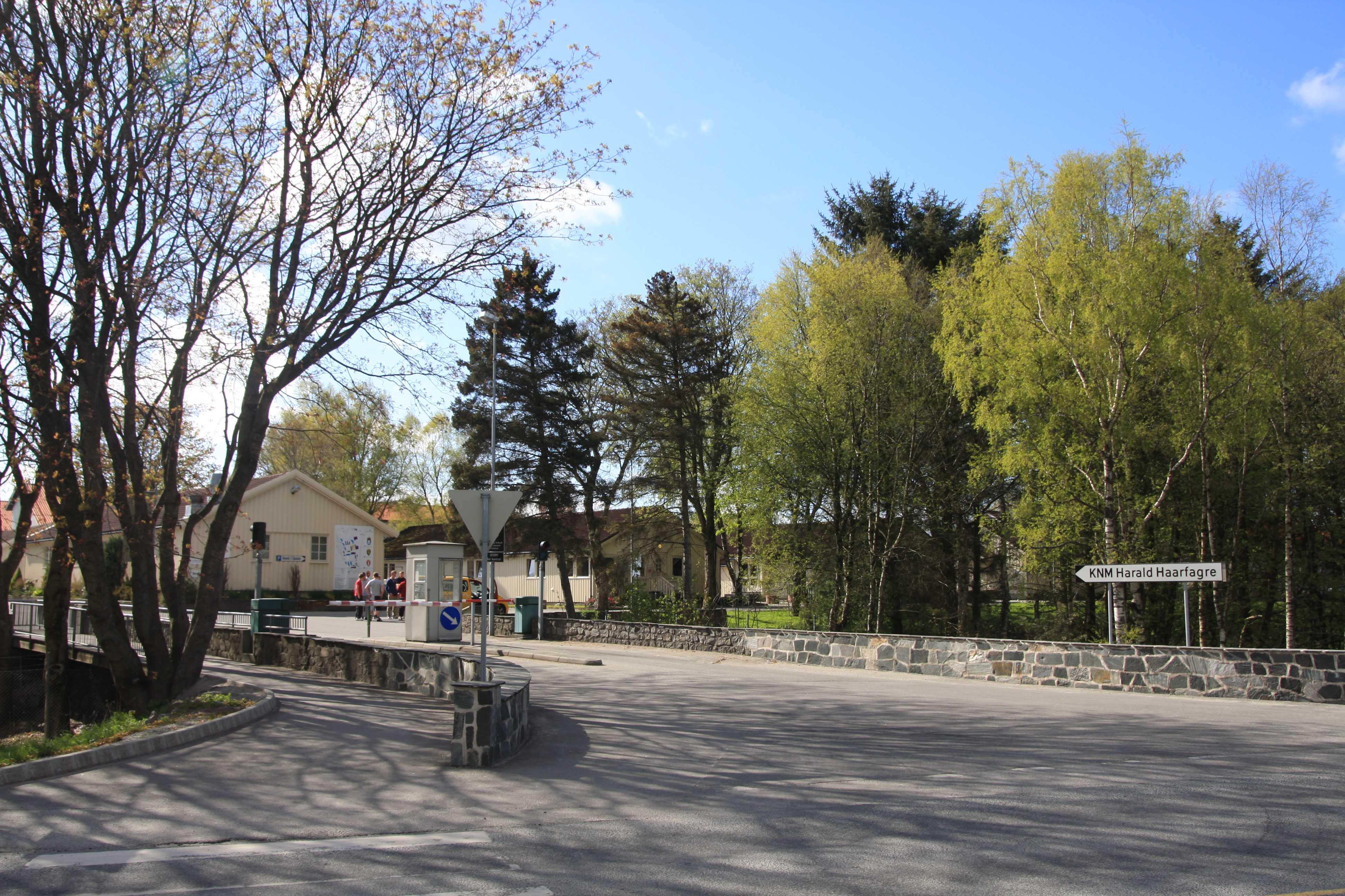 KNM Harald Haarfagre